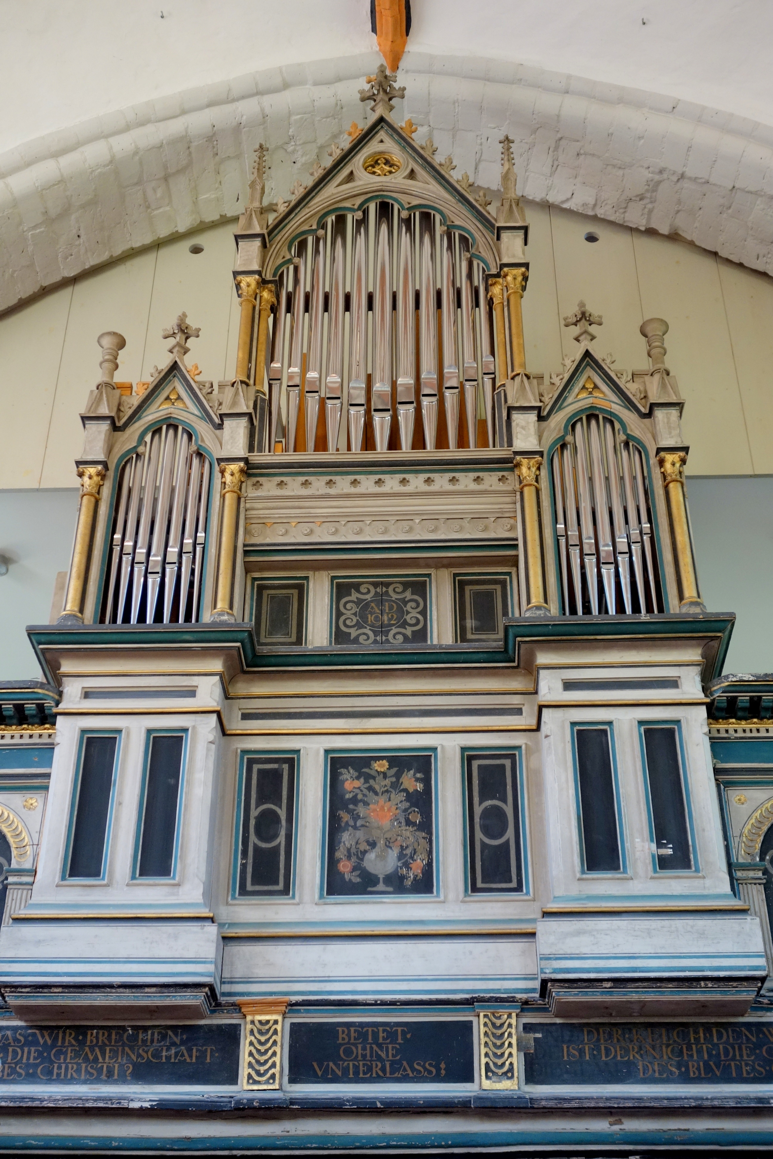 Hospitalkirche St. Laurentius Neuruppin, Landkreis Ostprignitz-Ruppin, Brandenburg, Deutschland